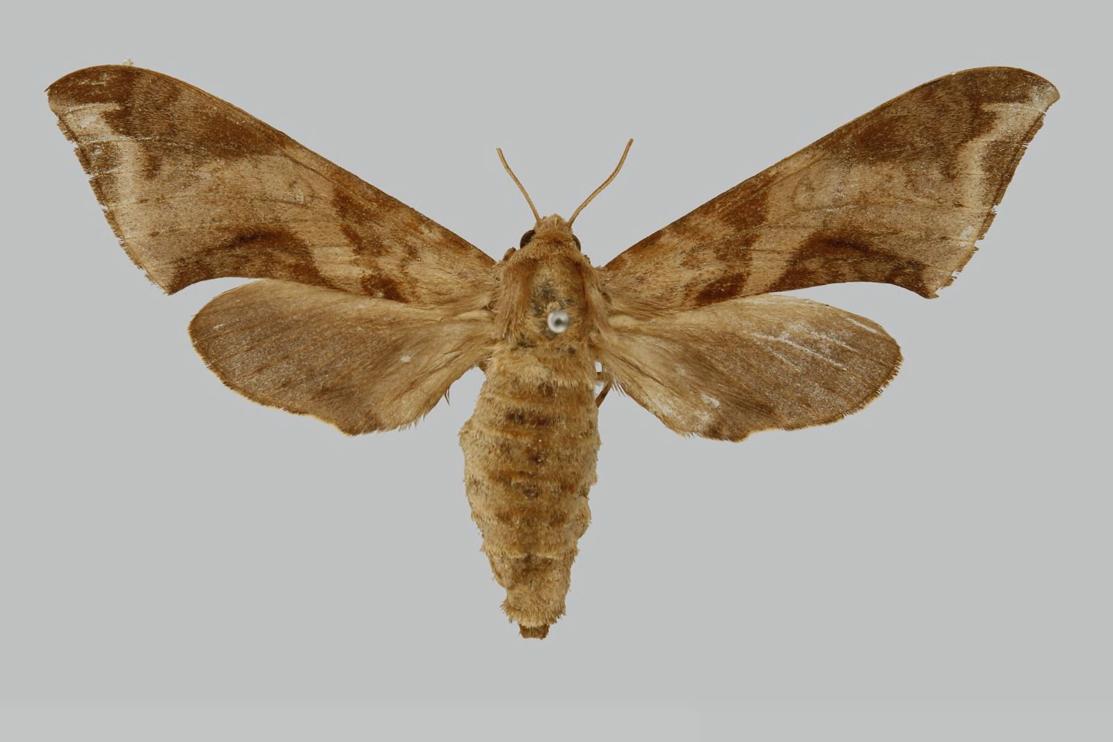 Chloroclanis virescens virescens, female, upperside. Ivory Coast, Lamto -RCI